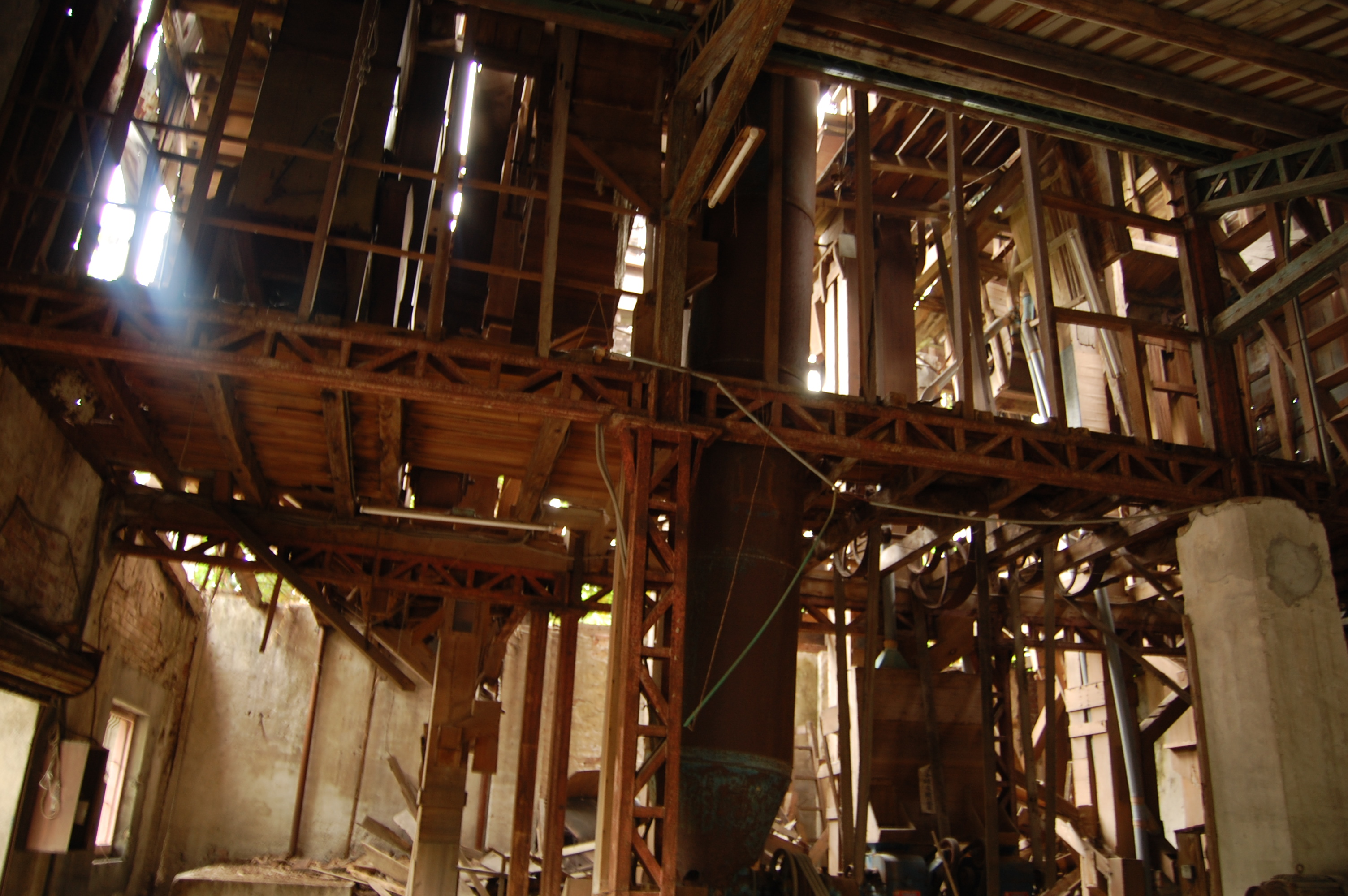 竹田傳統碾米廠